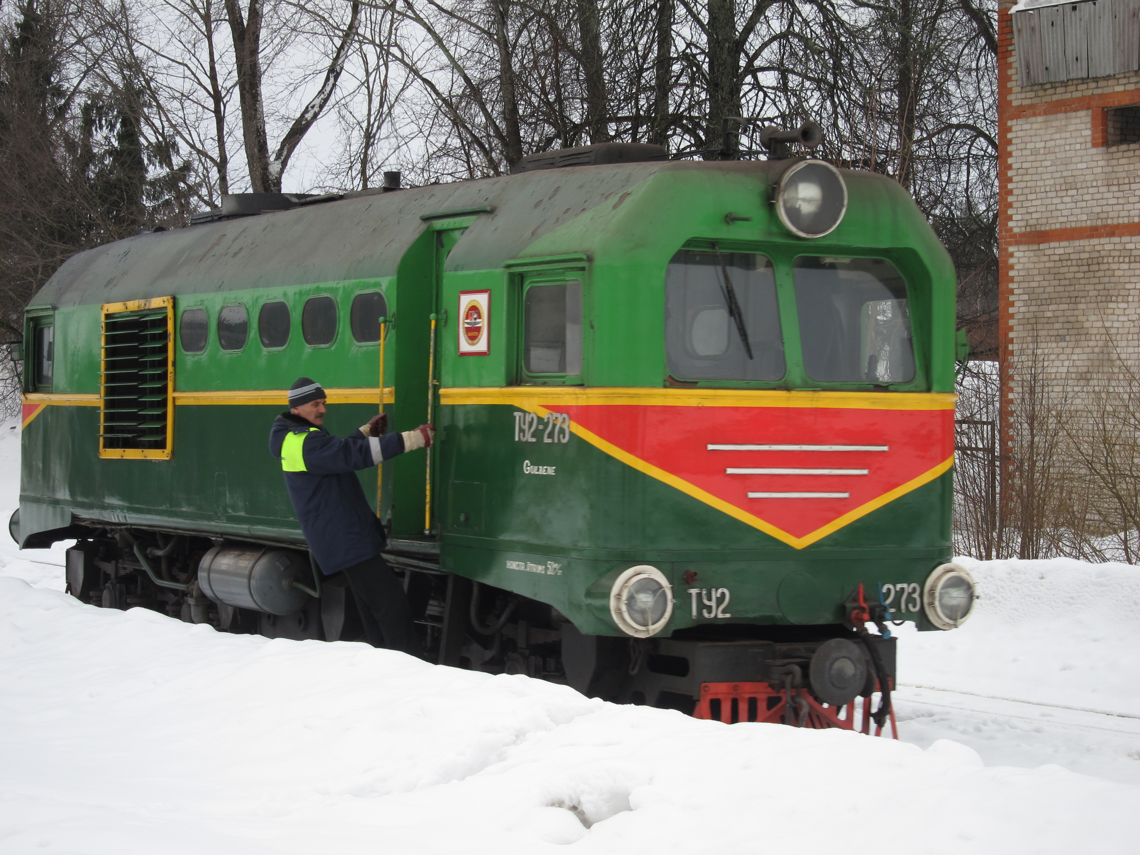 Lokomotīve TU2-273 Alūksnes stacijā